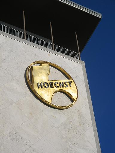 Hoechst-Haus am Steinplatz 1 in 10623 Berlin. Erbaut 1954 - 1955 unter den Architekten Geber & Risse. Detailansicht mit dem Firmenemblem der Hoechst AG. Urheber: EL